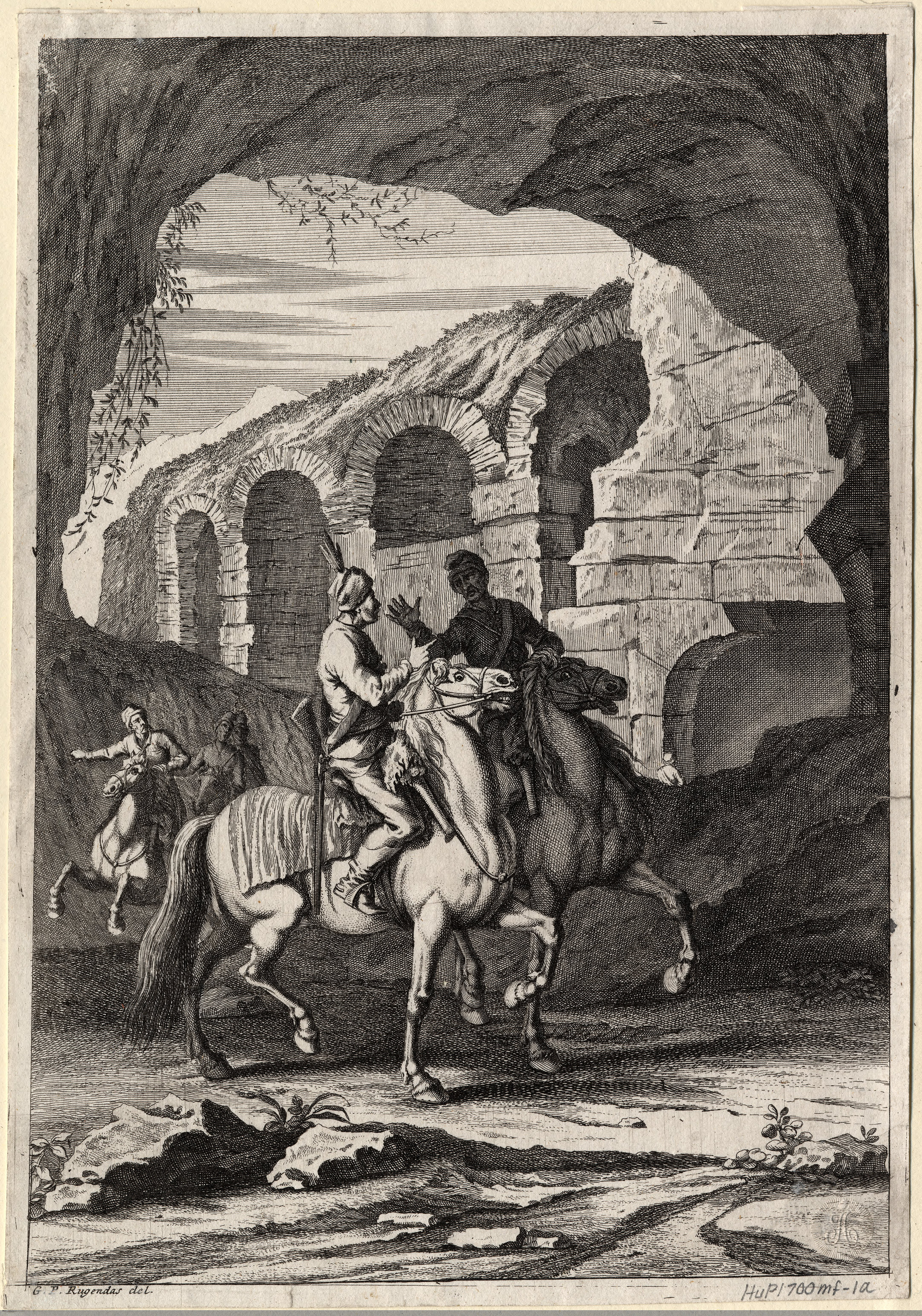 Georg Philipp Rugendas német festő és rézmetsző műve Két kuruc lovas